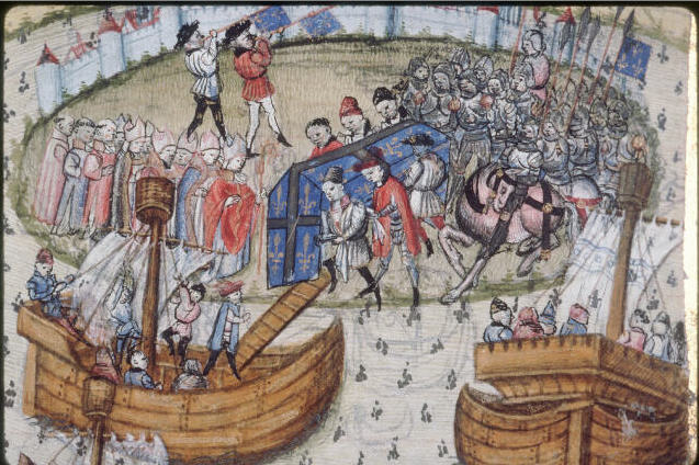 Rakev Ludvíka IX.